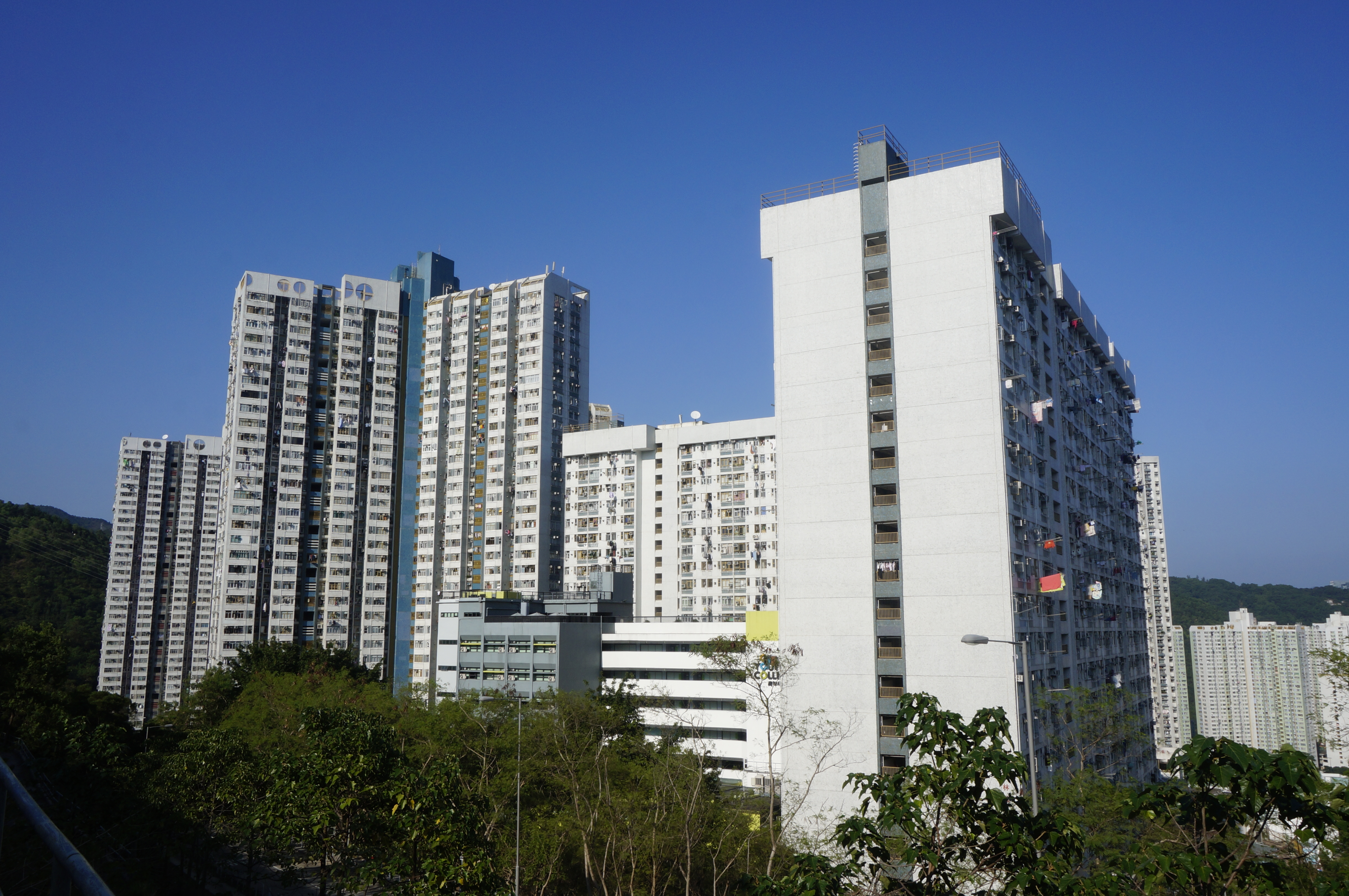 翠林邨各座大廈